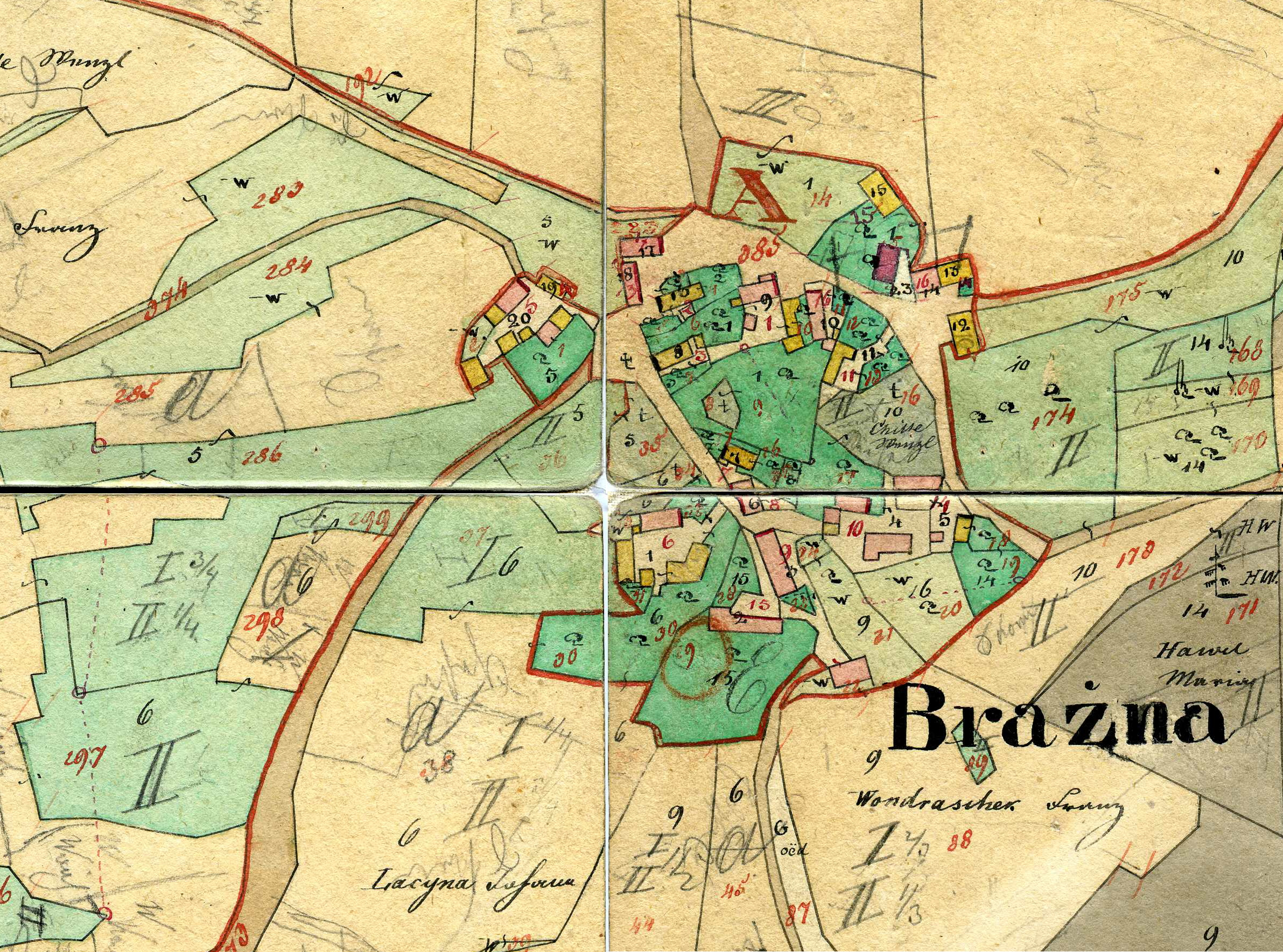 Nejstarší katastrální mapa Bražné - indikační skica z roku 1839 (intravillán)